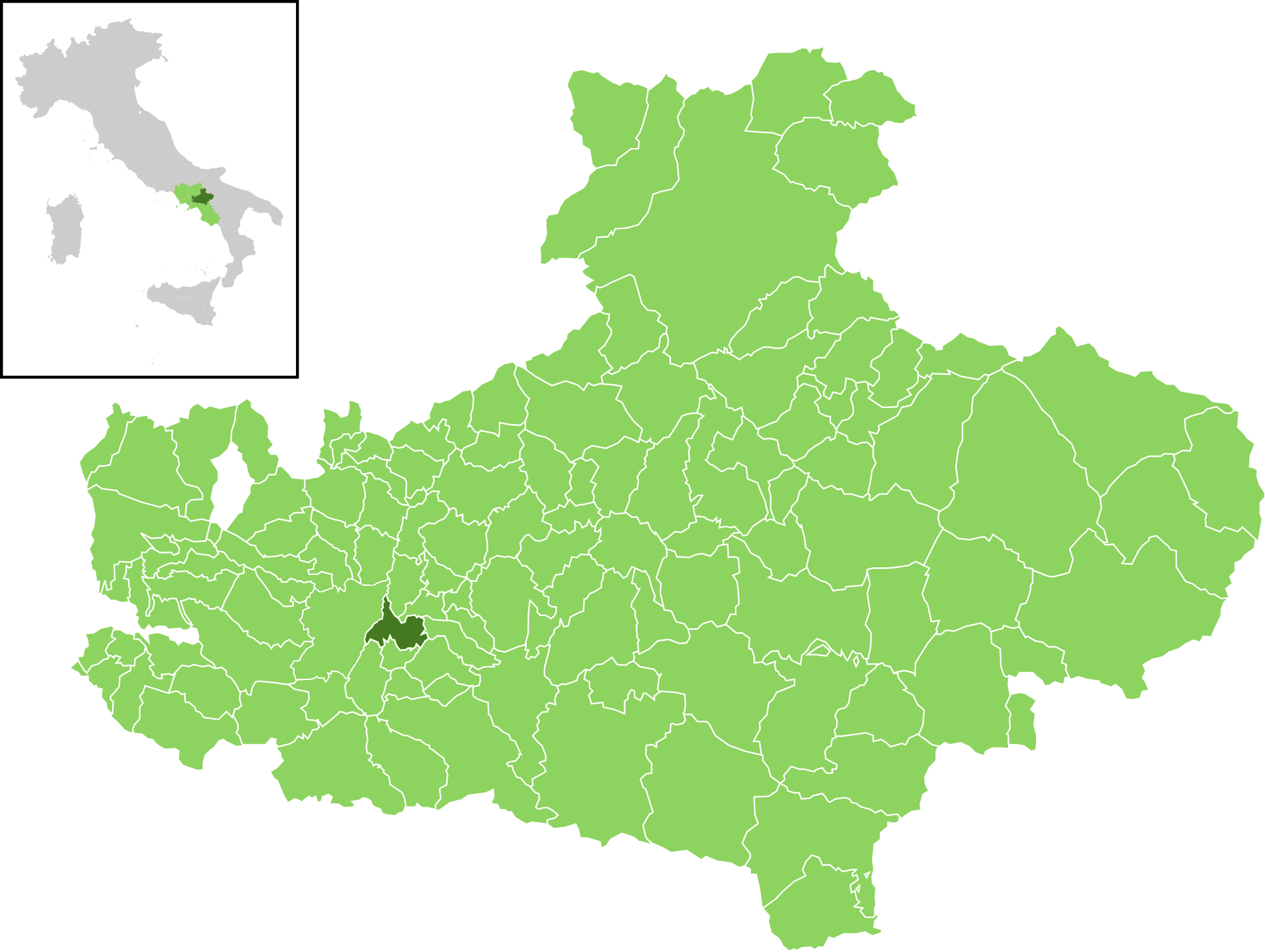 Il comune all'interno della provincia di Avellino